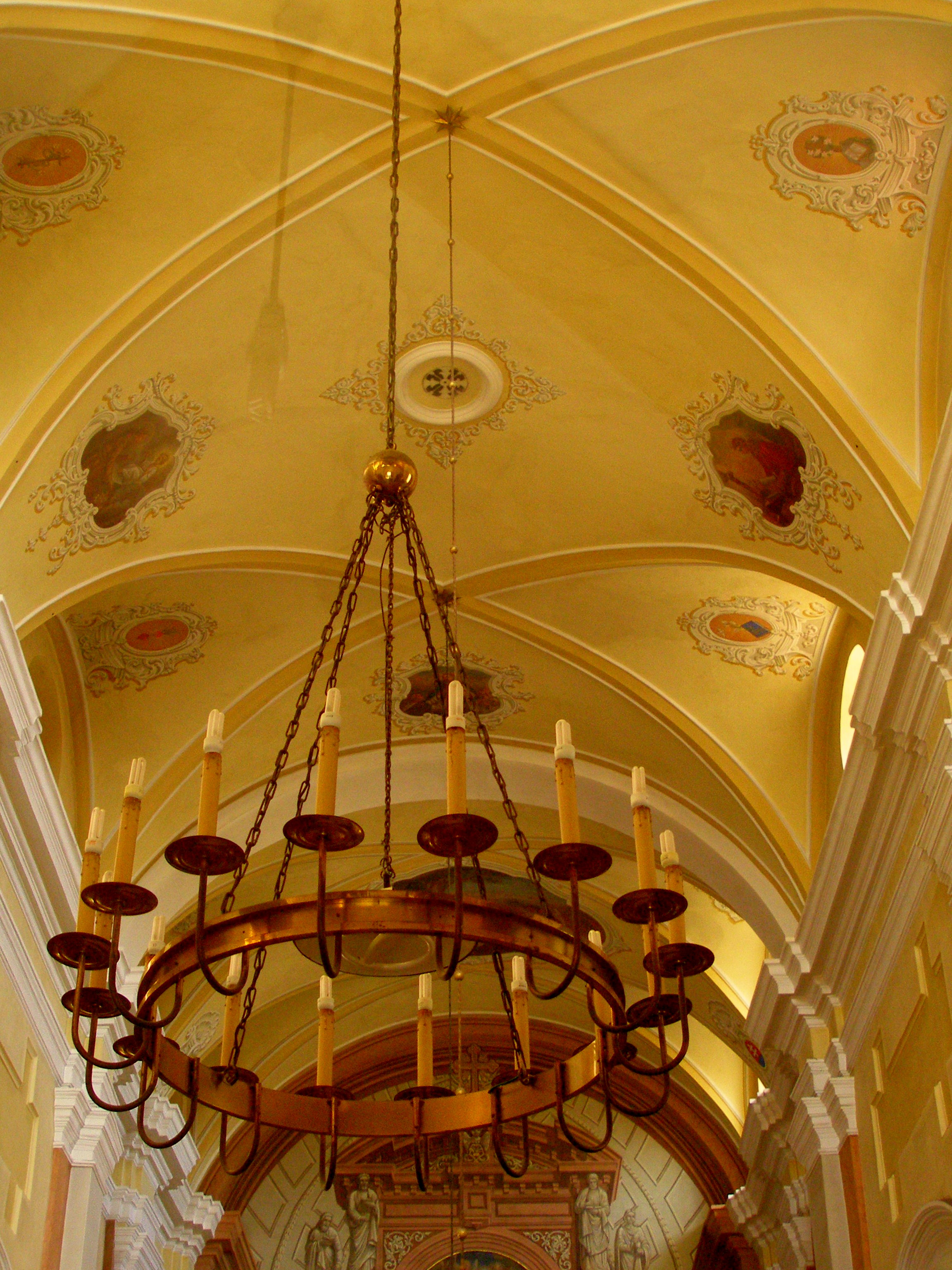 Kostol svätého Jozefa (františkánsky) Pôvodne gotický jednoloďový kostol karmelitánov z roku 1380. V druhej polovici 17. storočia prestavaný pre františkánov. Barokovú úpravu ukončil staviteľ Ján Tornyossi v rokoch 1709 až 1718. Sochy svätcov na fasáde sú z dielne Šimona Griminga z roku 1734.